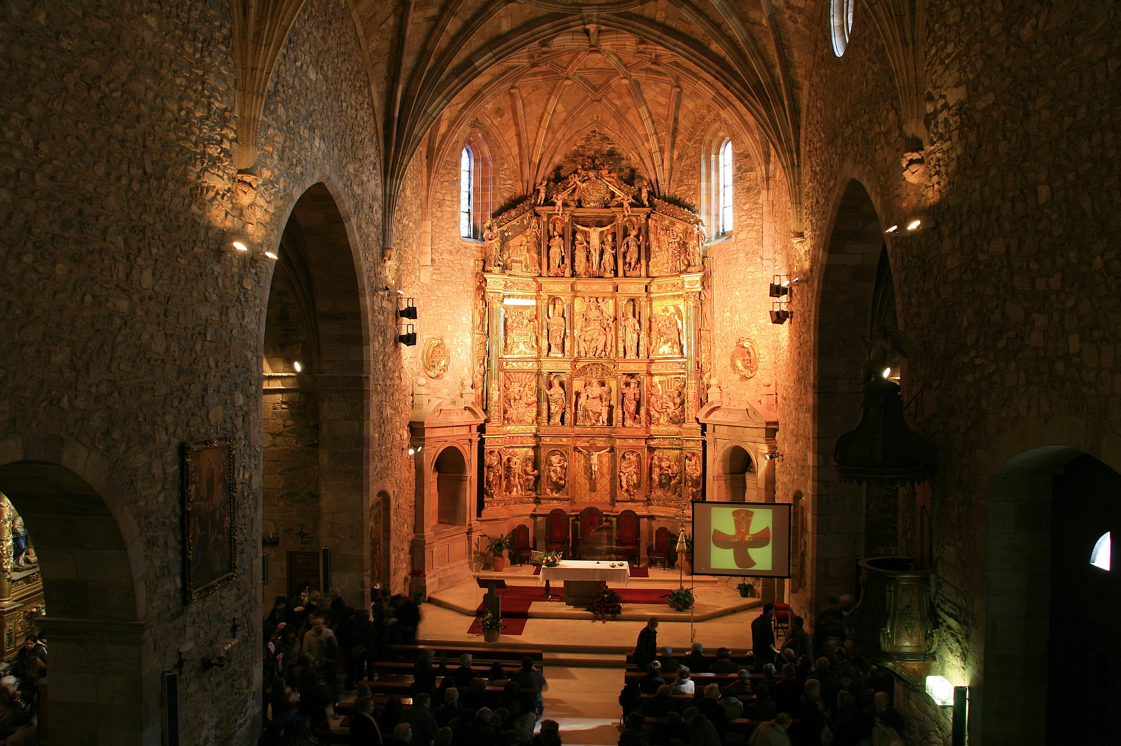 Gótica de finales del siglo XV y principios del XVI, con planta de cruz latina y cabecera poligonal. La torre, posiblemente del siglo XV, tiene aspecto de fortaleza, es de planta rectangular formada por tres tramos y rematadas por almenas. Su portada de traza barroca data de principios del siglo XVII. Del conjunto de la iglesia destaca el retablo del altar mayor de finales del siglo XVI, obra del escultor Francisco de Ágreda. En él se aprecian grandes influencias de la escuela de Valladolid. Recientemente restaurada y embellecida. Tiene muestras románicas, góticas y renacentistas. Esbelta torre (atalaya-castillo), interesantísimo retablo atribuído a Fernando de Agreda. Cuenta con abundantes retablos barrocos y con los enterramientos de los Salcedo y los Morales con sus escudos como patronos de la Capilla o Altar Mayor. Es del siglo XVI con planta de cruz latina y cabecera poligonal. Tiene aspecto de fortaleza y está dedicada a Santa Maria la Mayor o de la Asunción.